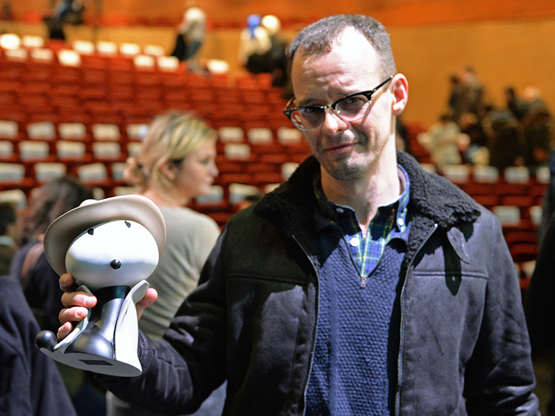 Marcello Quintanilha avec son Fauve à la cérémonie de remise des prix du Festival International de la Bande Dessinée d'Angoulême 2016.